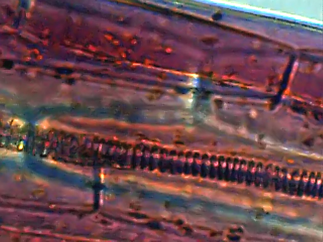 Spiral vessel of a Drosera paradoxa tentacle